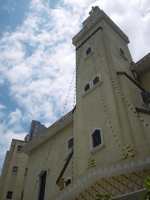 中文（香港）: 聖安多尼堂外貌, 薄扶林, 香港, 中國